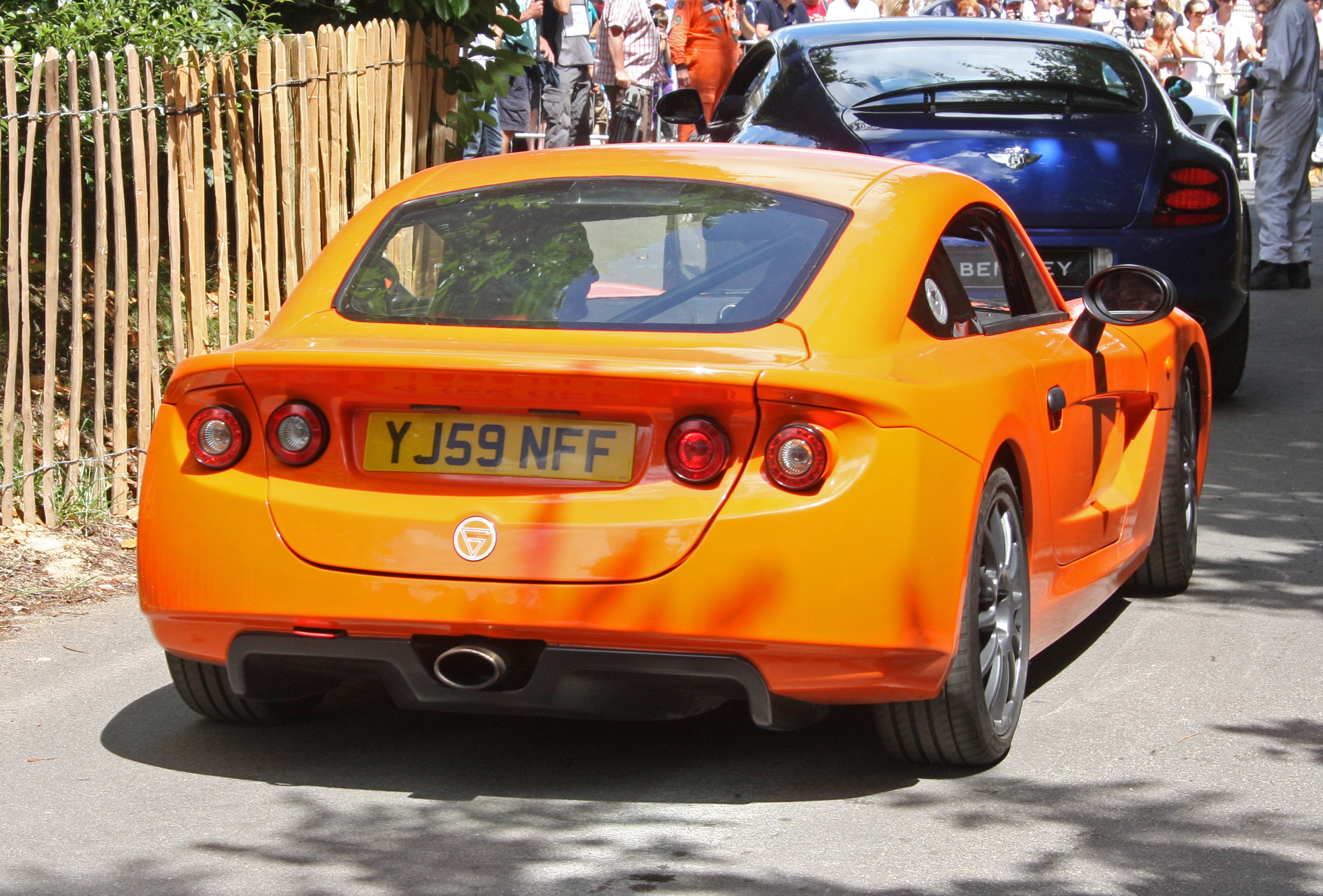 Ginetta G40